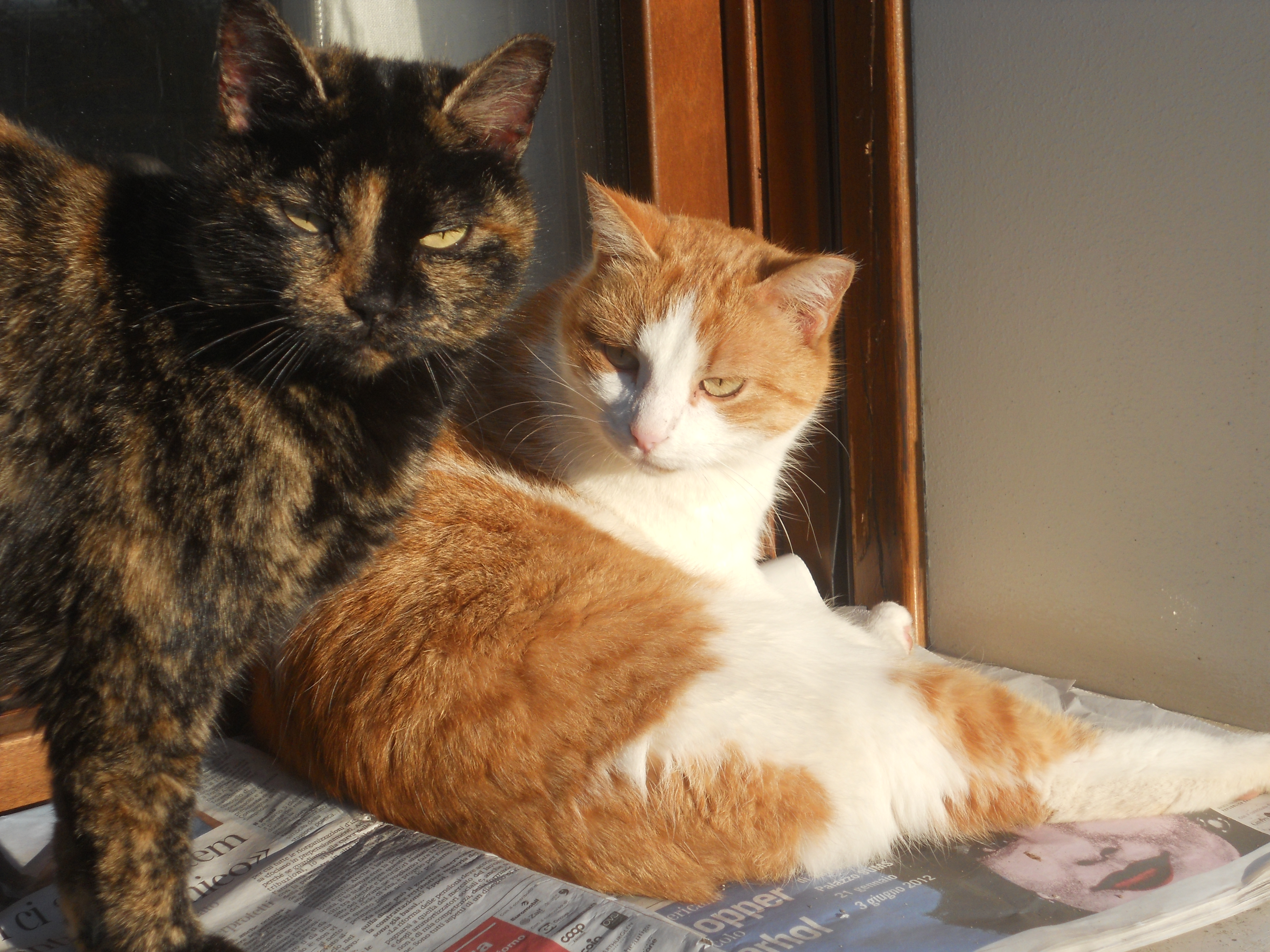 Una Coppia di gatti (femmine) di razza europea in Italia